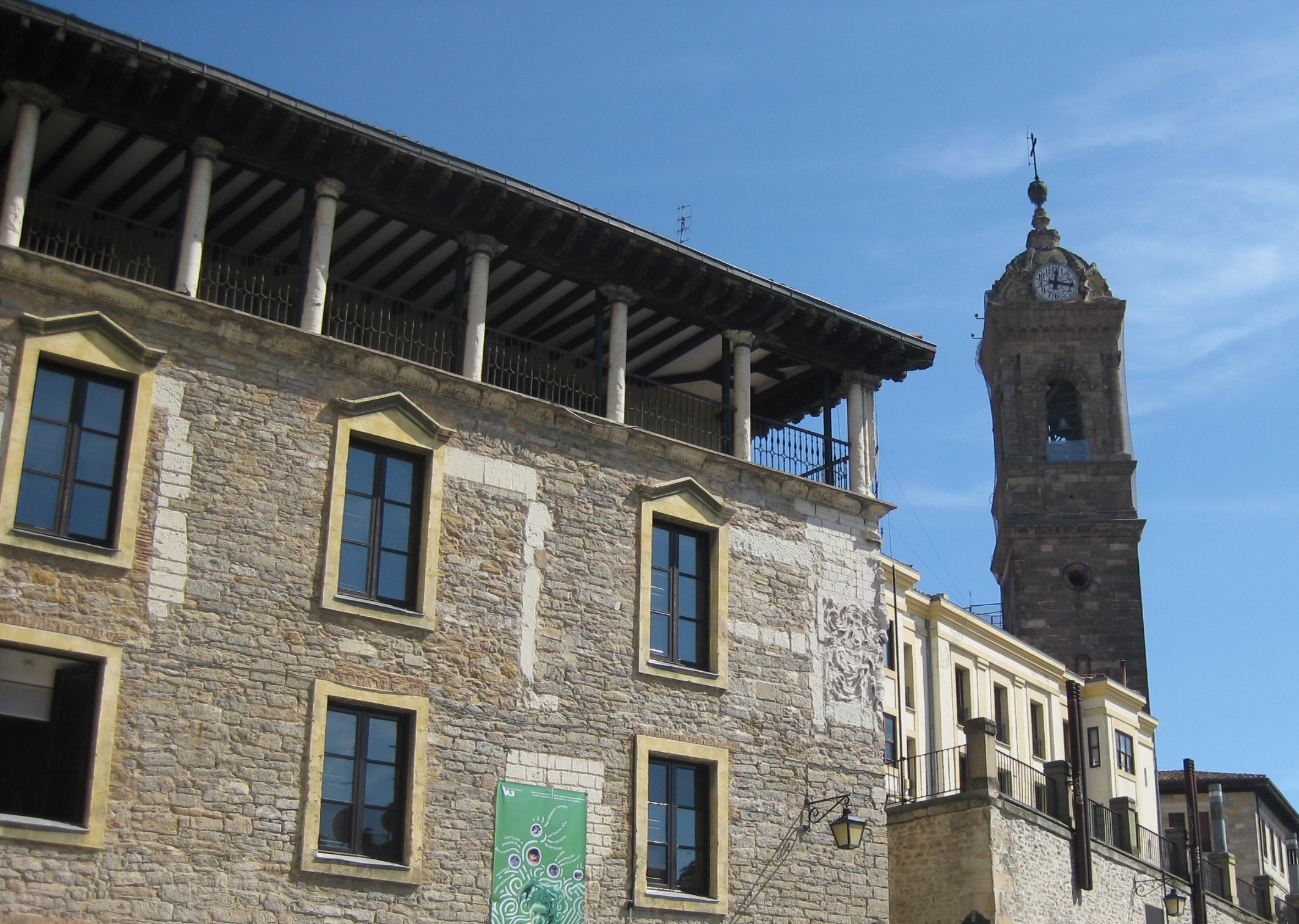 Palacio renacentista de Villasuso y Torre de la iglesia de San Vicente en la Plaza del Machete, en el casco medieval de Vitoria-Gasteiz.